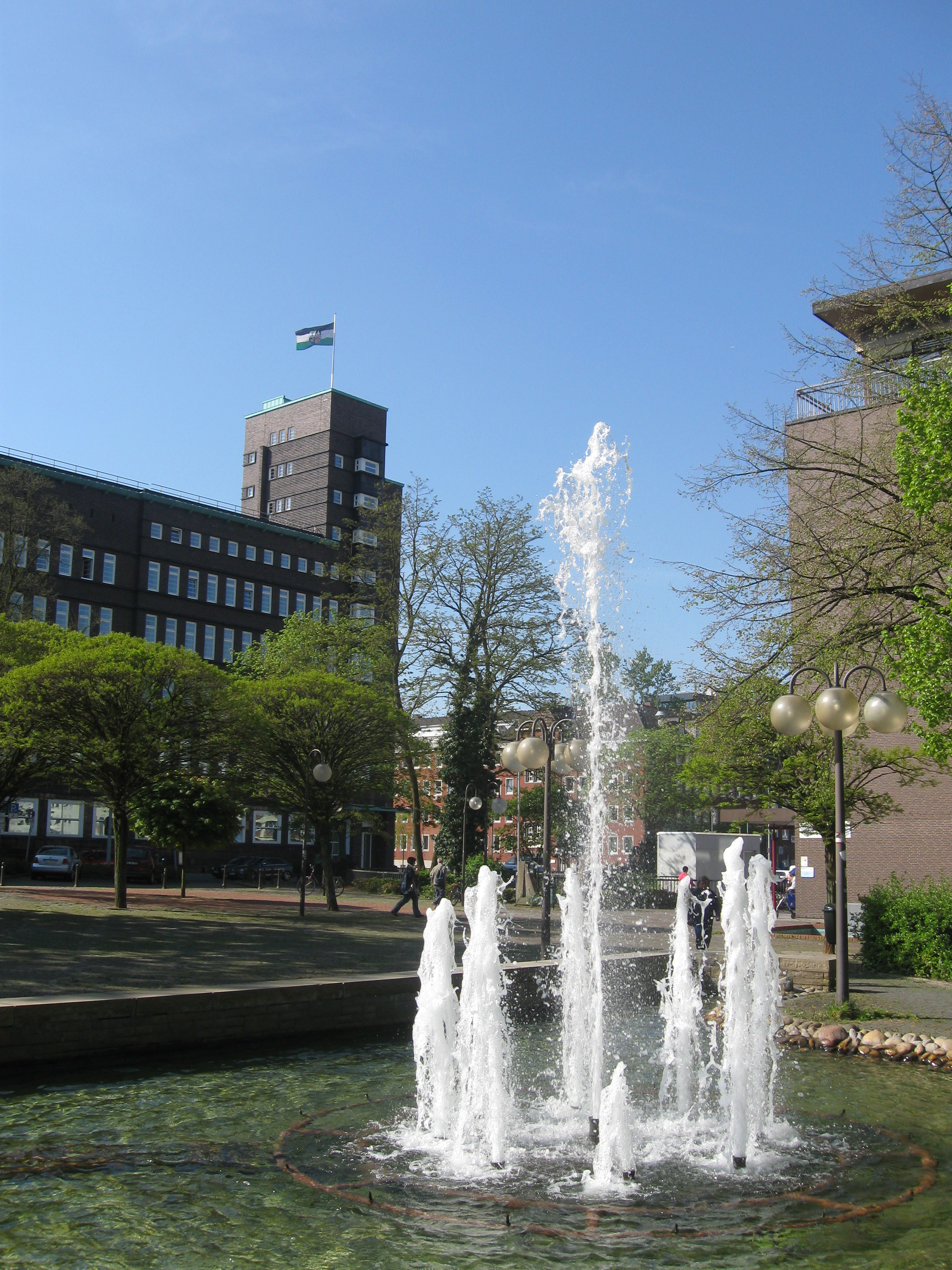 Der Turm und Nordfassade des Hans-Sachs-Hauses vom Fritz-Rahkob-Platz über die Vattmannstraße gesehen. Auf der Spitze des Turmes weht die Gelsenkirchener Stadtfahne. @JordiCuber, JordiCuber: Infos zum Springbrunnen währen hier wichtig und nicht wo man die Flagge kaufen kann